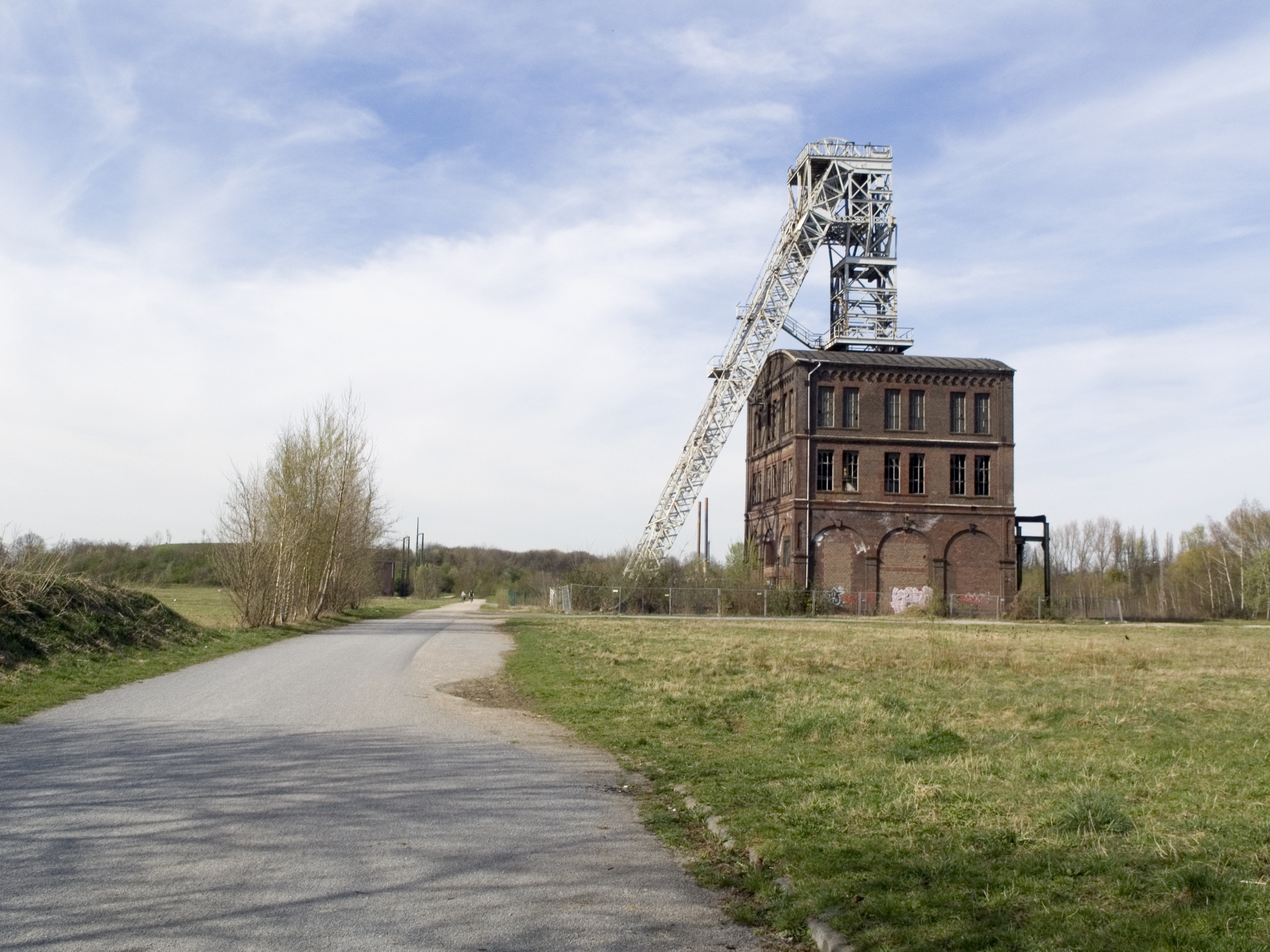 Северный Рейн - Вестфалия, Оберхаузен - шахта Штеркраде